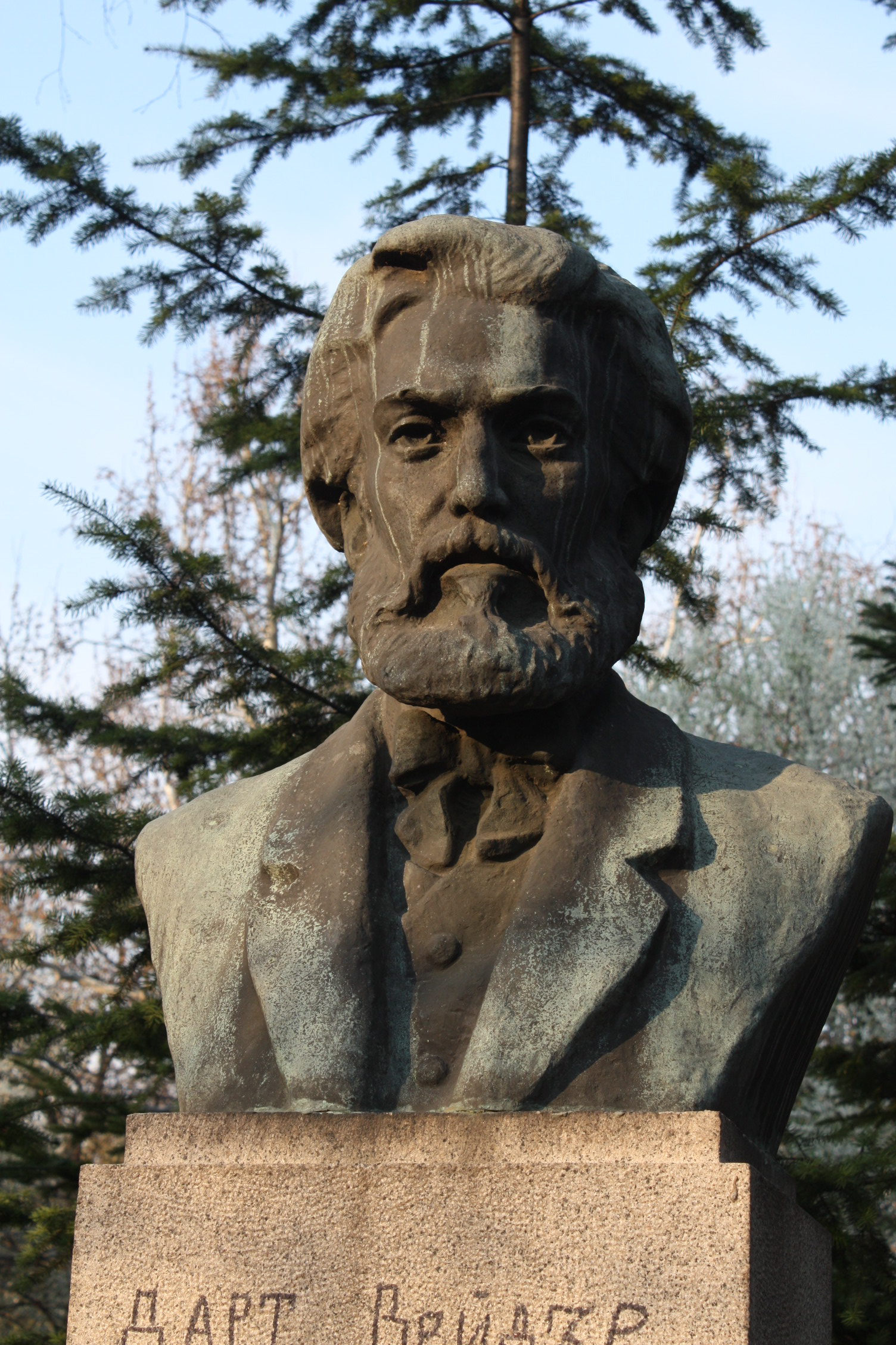 Borisova gradina, Борисова градина, Bulgaria